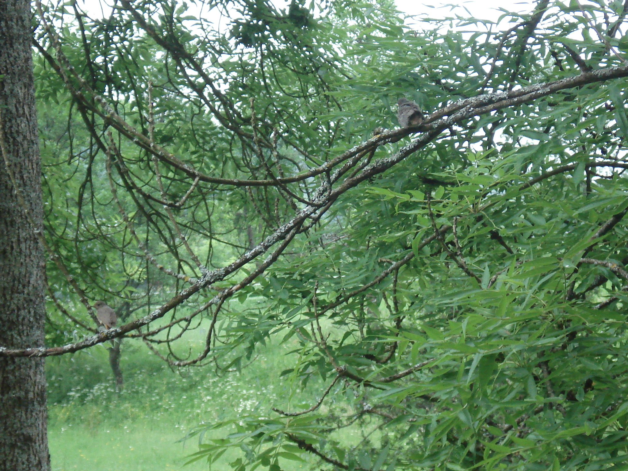 6225 Rakulik, Slovenia